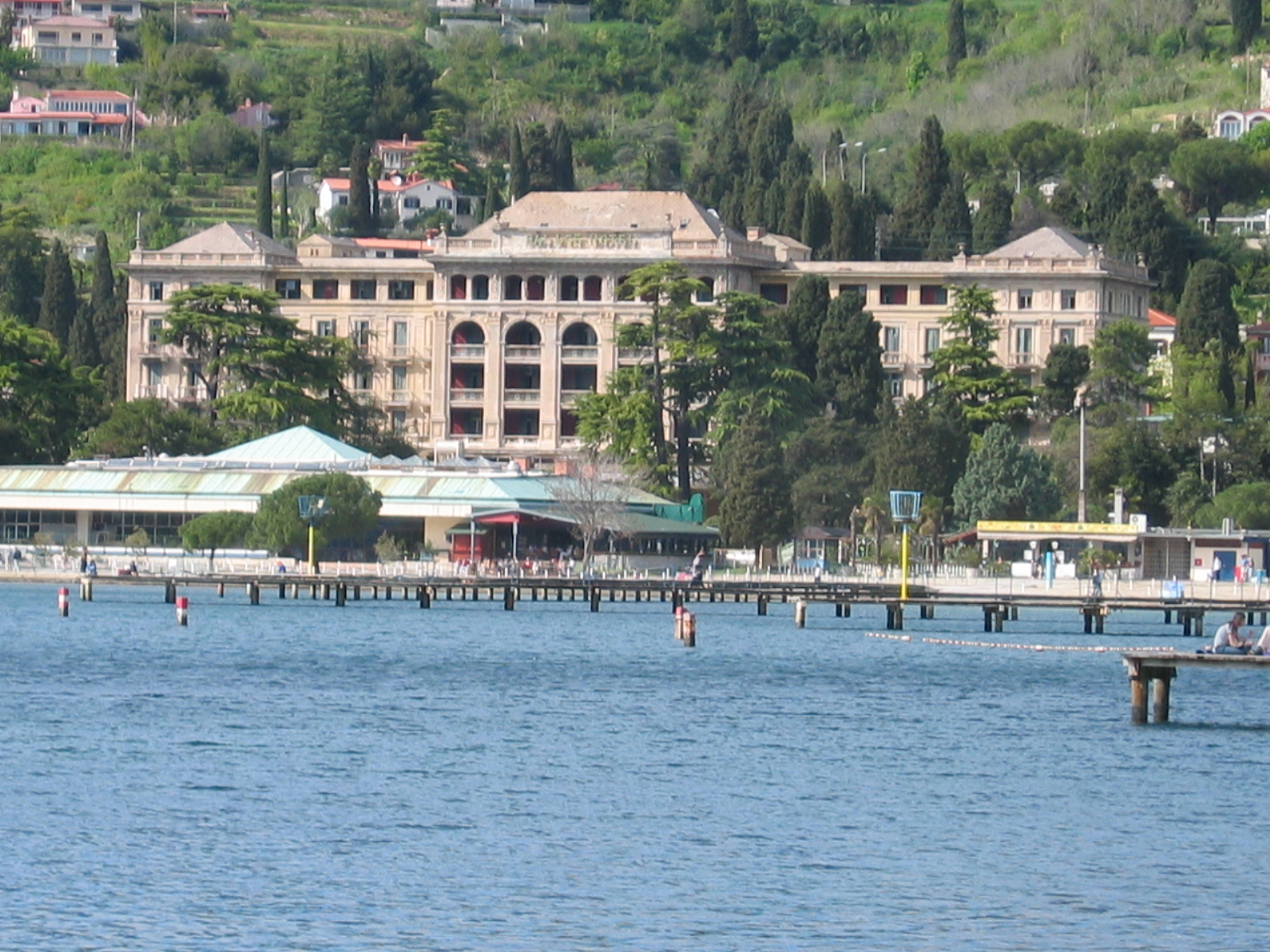 Hotel Palace, Portorož. Avtor: Ziga.